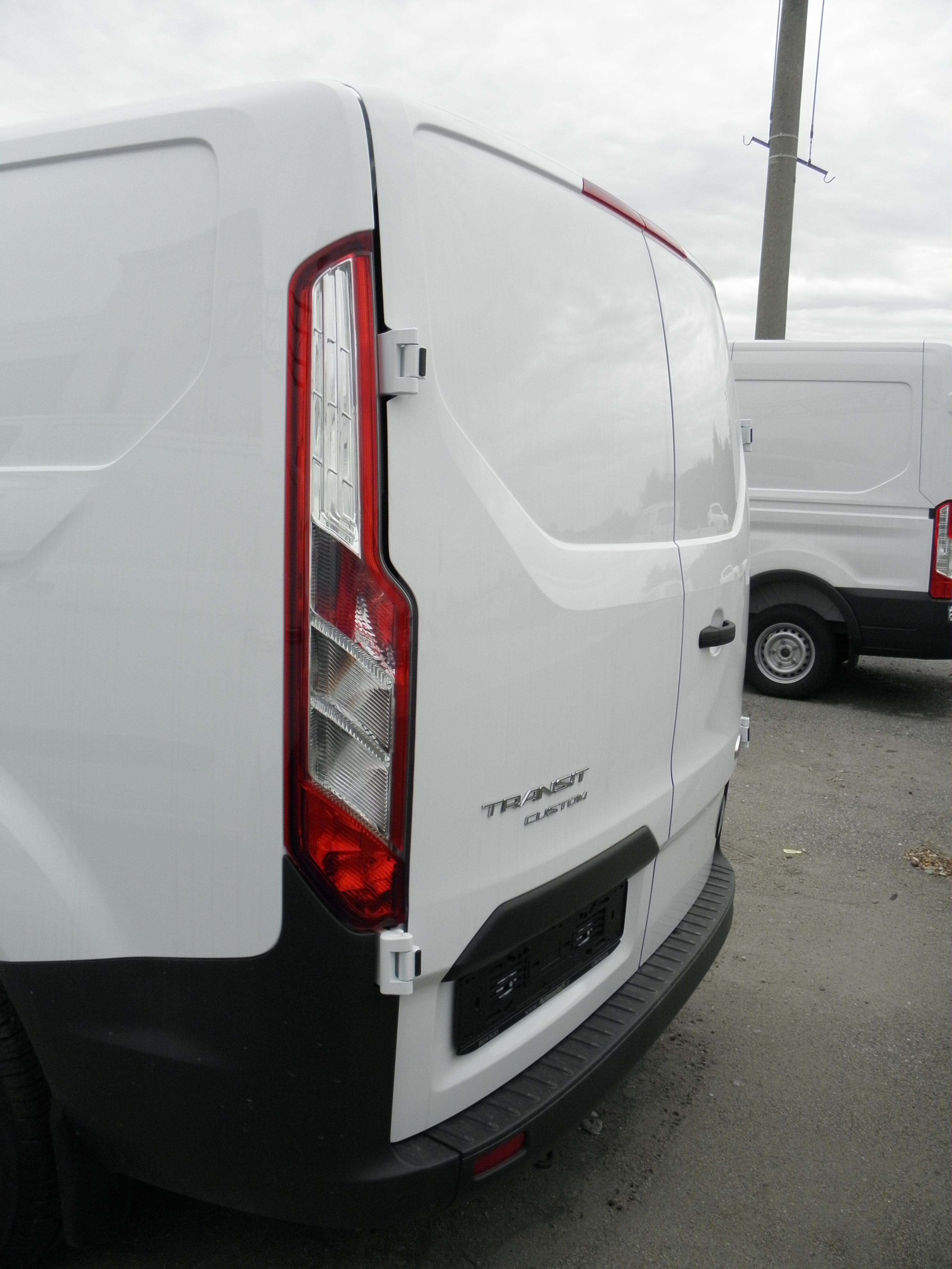 Ford Transit Custom versione 2014 fotografato a Rovigo nel piazzale del concessionario di zona.